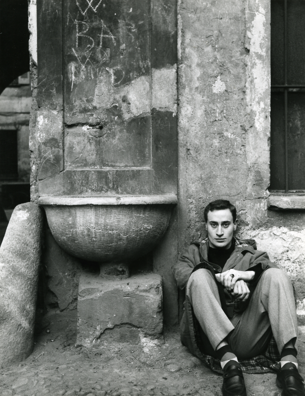 Servizio fotografico : Italia, 1965 / Paolo Monti. - Stampe: 7 : Positivo b/n, gelatina bromuro d'argento/ carta, 18x24, 24x30. - ((Al verso delle stampe manoscritto: "Manzi", "Kodra 1958", "Gio Pomodoro 1958", Lucio Fontana".Sul coperchio della scatola manoscritto: "Ritratti Artisti".